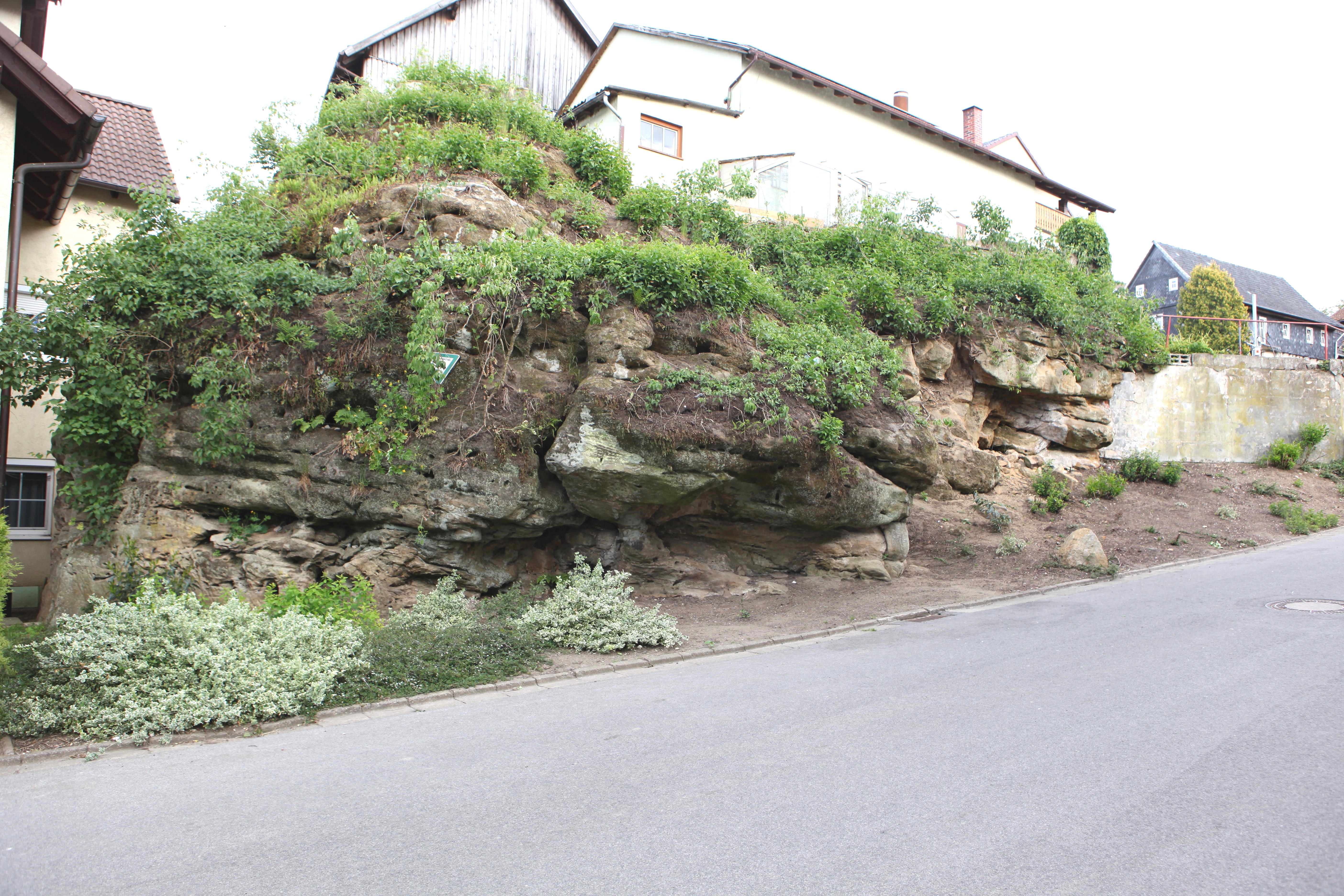 Blumenrod, An der Kehr; Naturdenkmal und Geotop "Ehemaliger Steinbruch An der Kehr in Blumenrod"